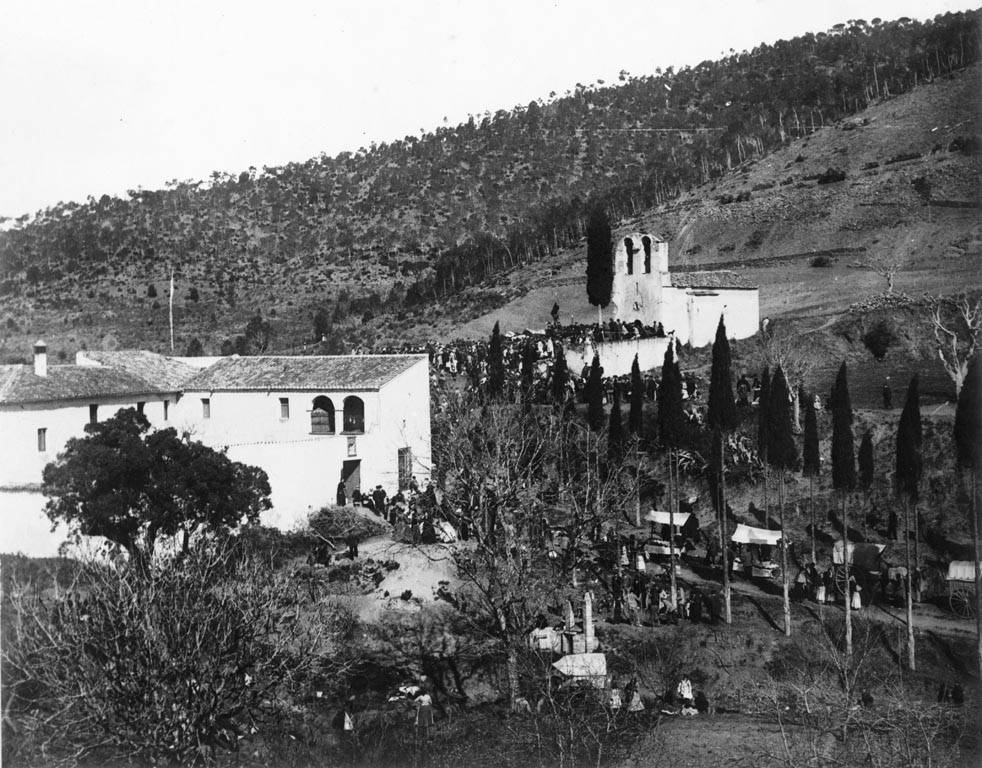 Ermita de Sant Medir i una masia propera amb gent. Cèsar August Torras i Ferreri